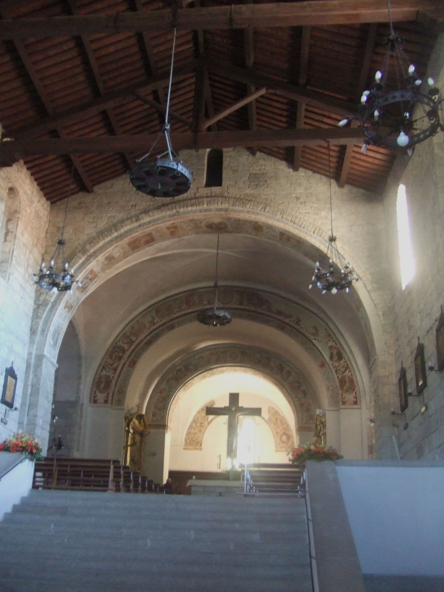 Nef surélevée de l'église de l'abbaye San Salvatore à Abbadia San Salvatore